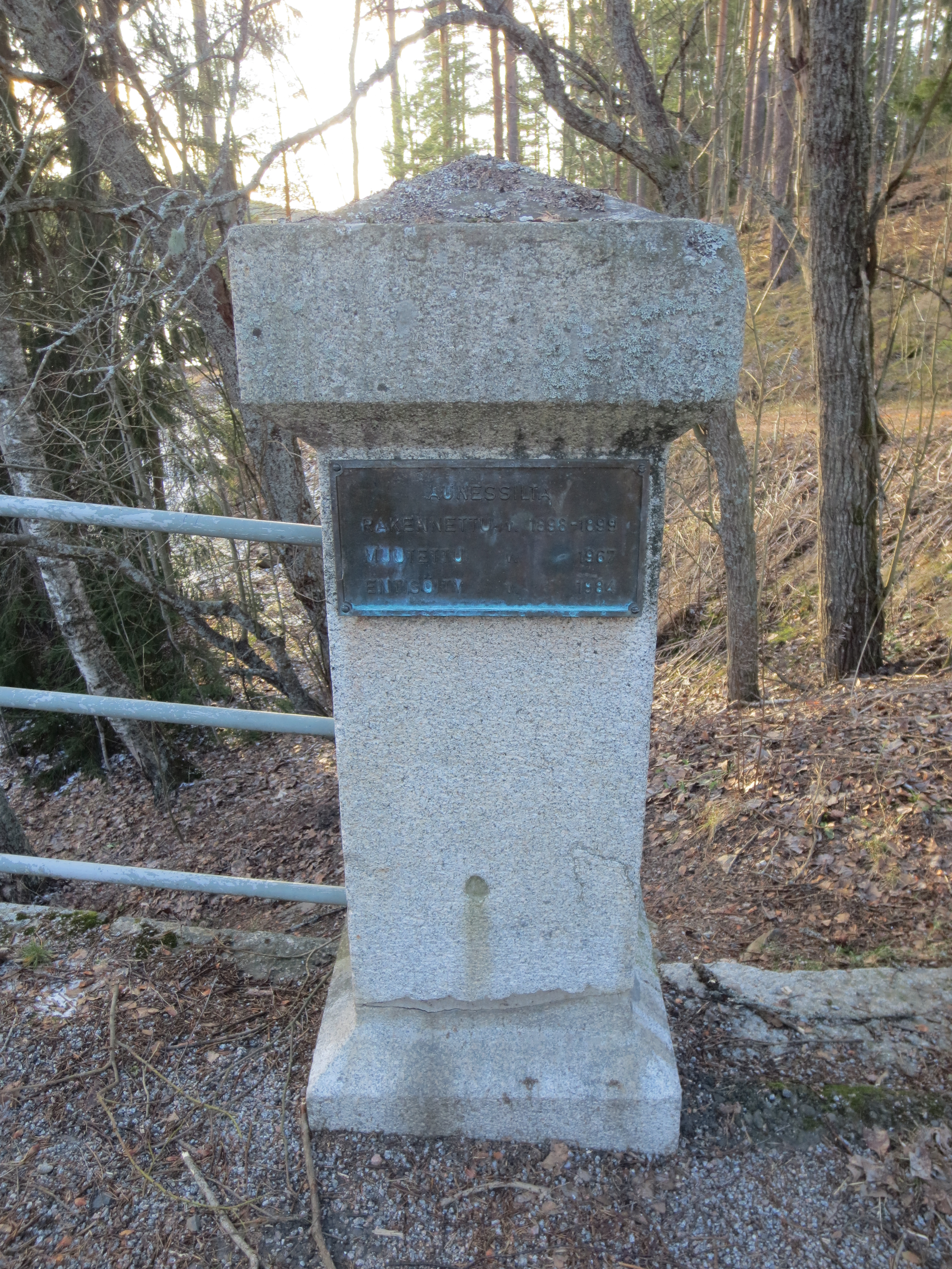 Aunessillan muistolaatta vuodelta 1984 Paarlahden rannassa Tampereella